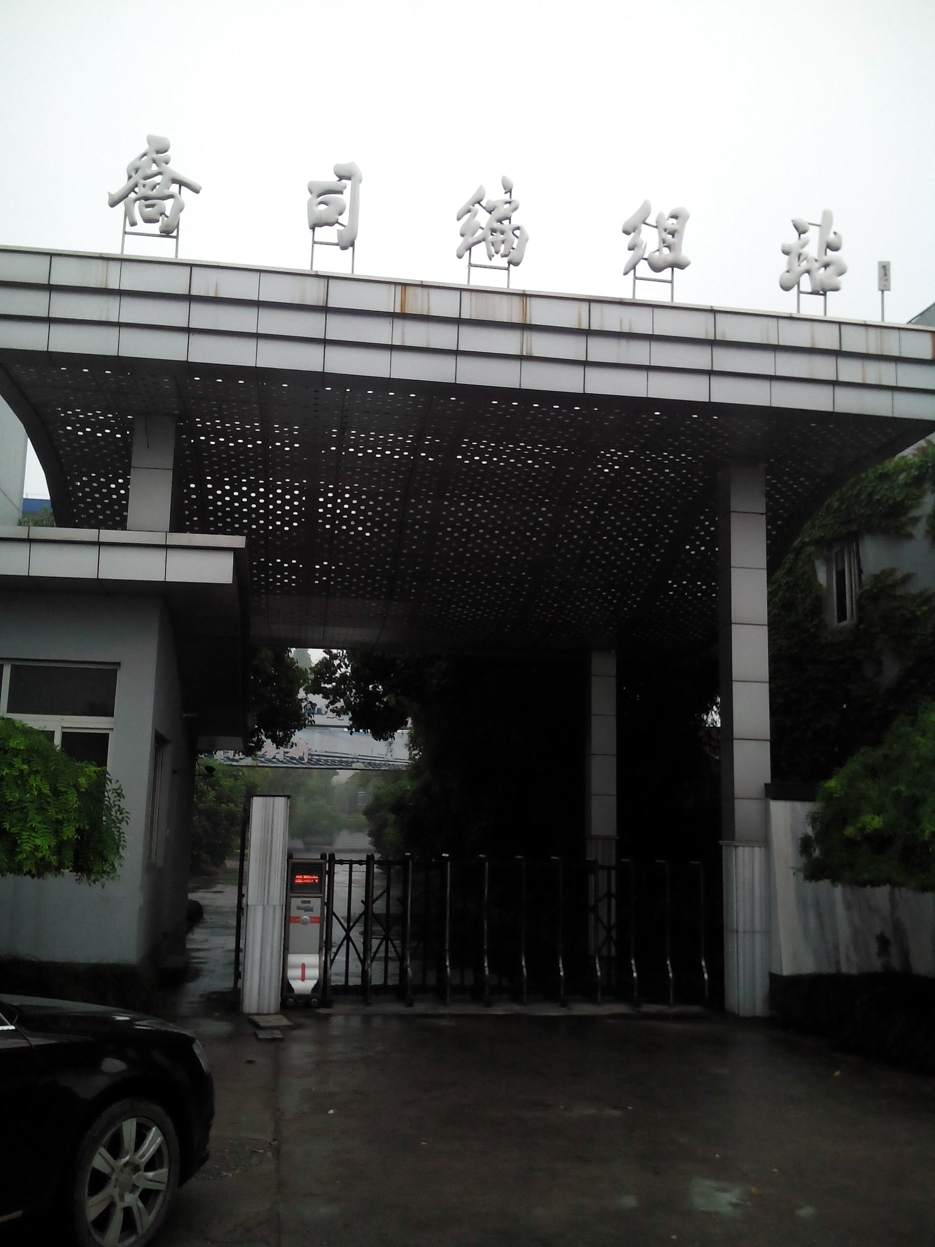 201405乔司站大门